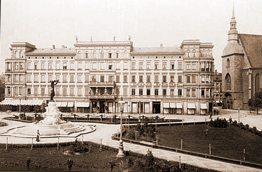 Postplatz in Görlitz